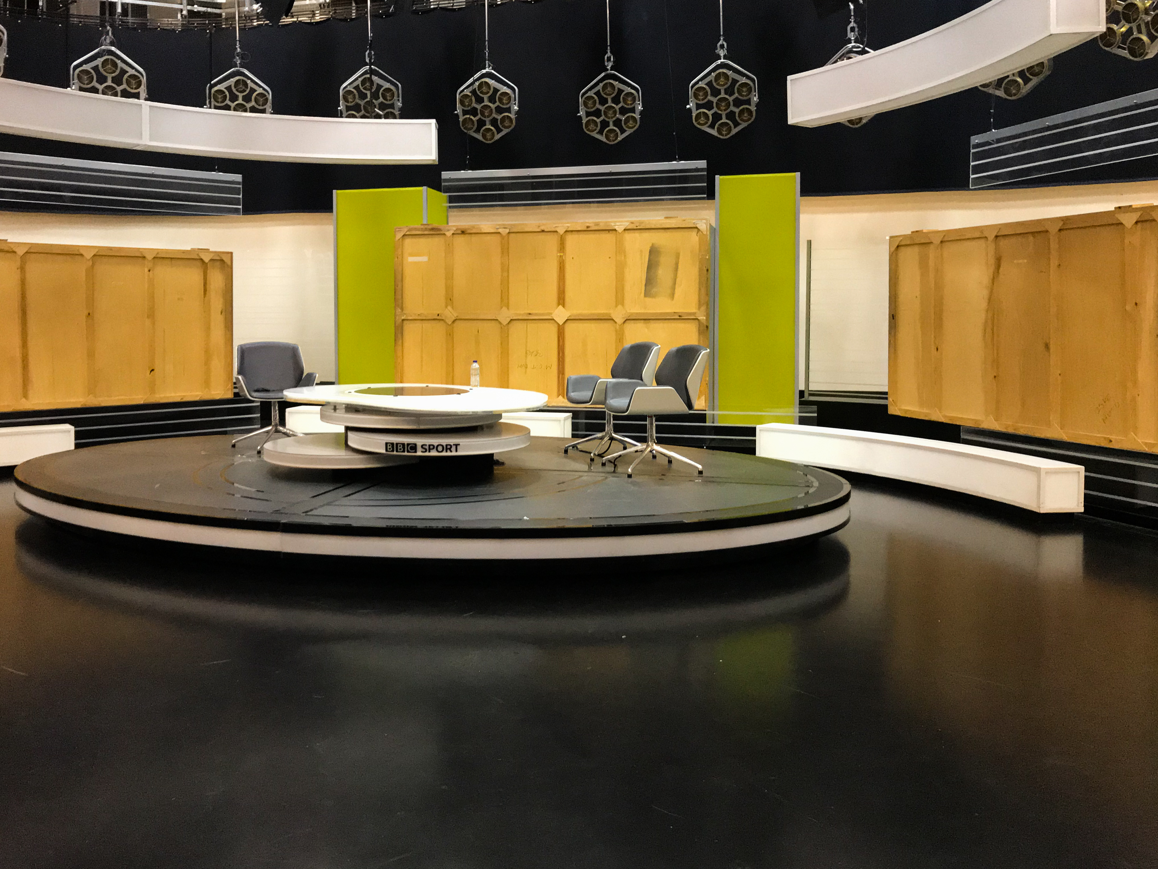 BBC Sport Studio, MediaCityUK, Manchester